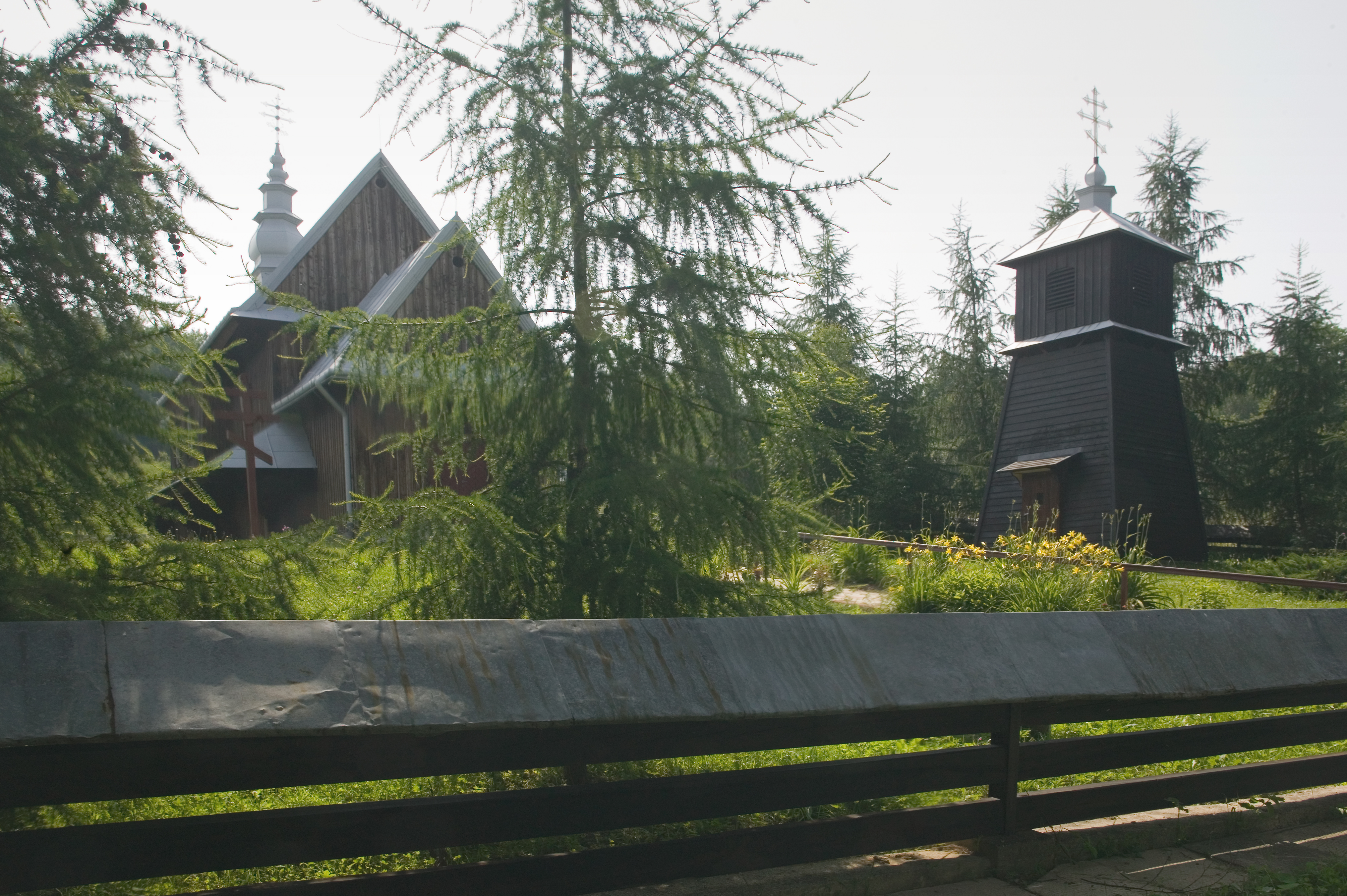 Rozdziele, cerkiew, pod wezwaniem Opieki Matki Bożej (Pokrow). W Rozdzielu od 1984 roku, została przeniesiona z Serednicy (Pogórze Przemyskie.